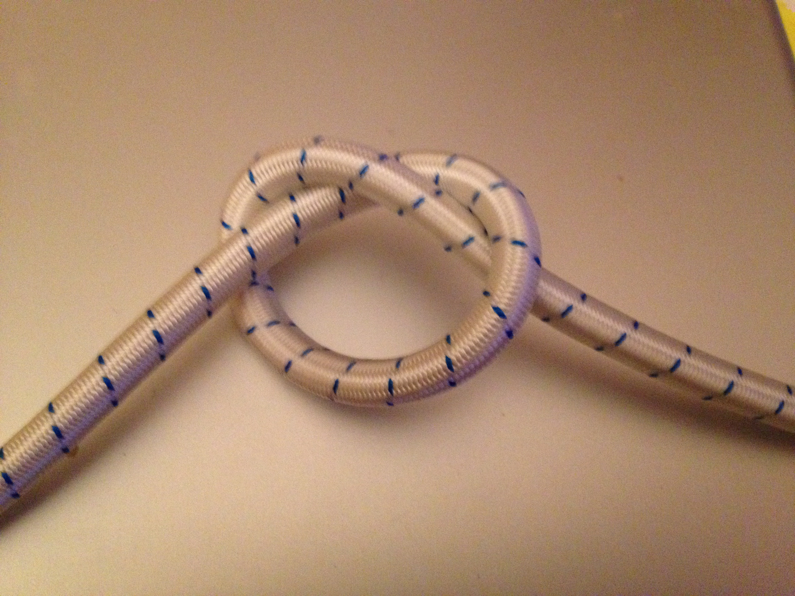 4=0 düğümü 1. adım Sağ ucu arkadan getirerek bir adi düğüm.